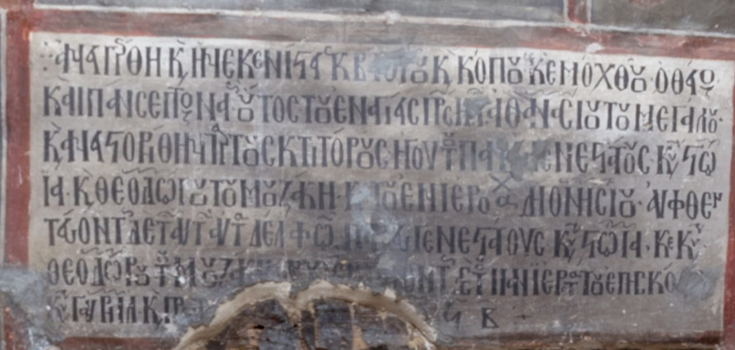 Καστοριά. Άγιος Αθανάσιος του Μουζάκη. Τοιχογραφία των τοπικών Αγίων Νικολάου και Αλεξάνδρου από τον Αγιο Αθανάσιο του Μουζάκη στην Καστοριά (14ος αι.)